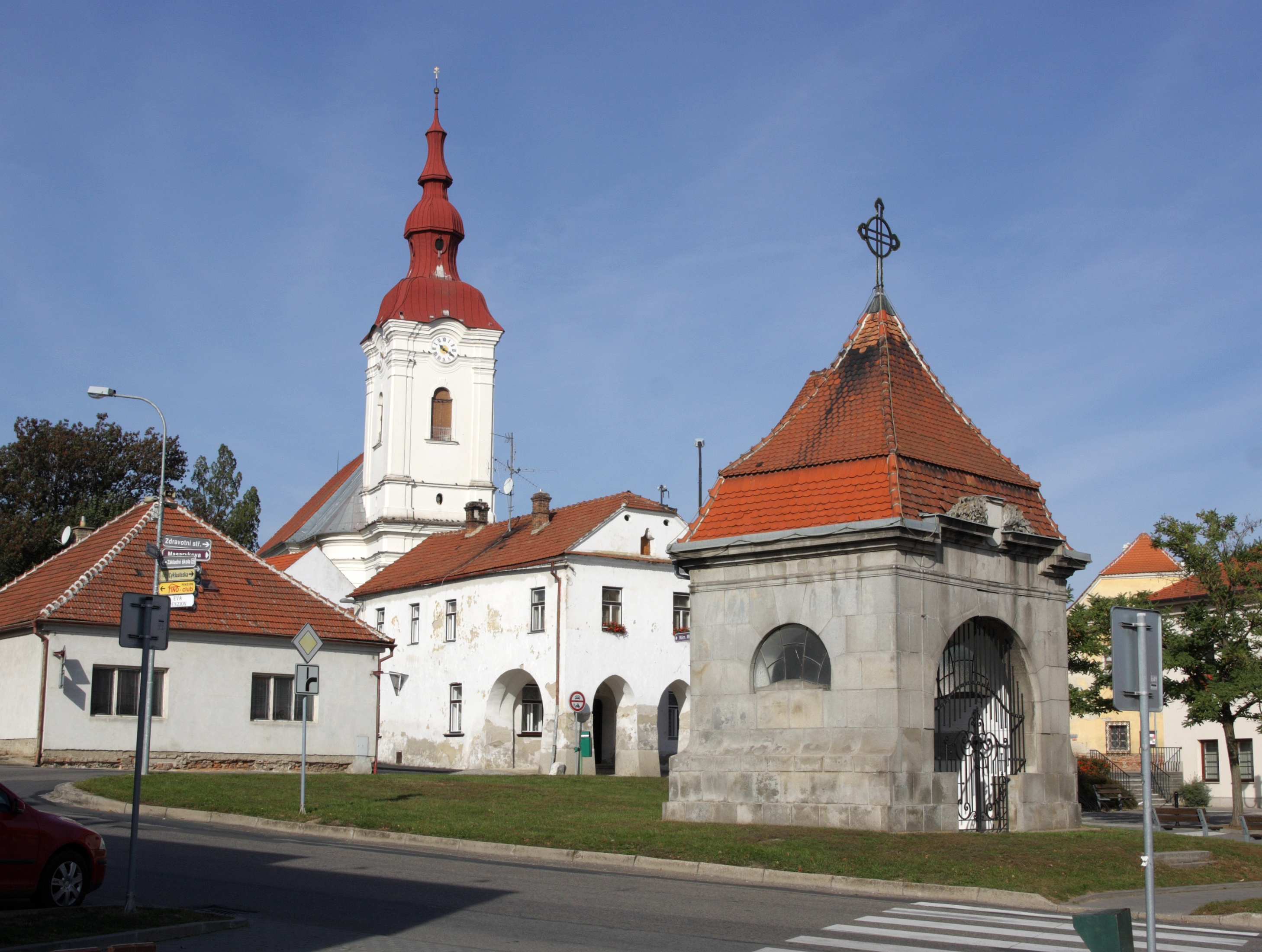 Modřice - náměstí Svobody, v popředí kaple sv. Václava.